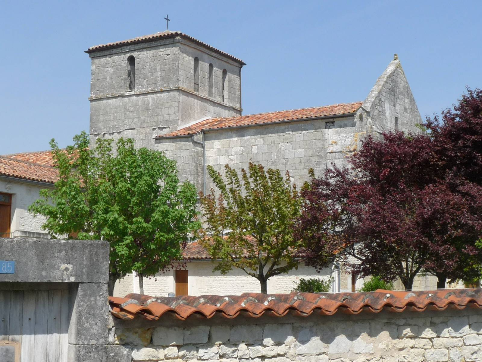 Eglise de Nercillac, Charente, France